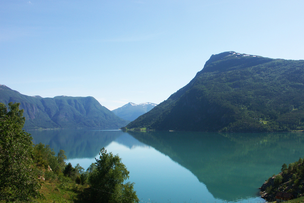 Lustrafjorden